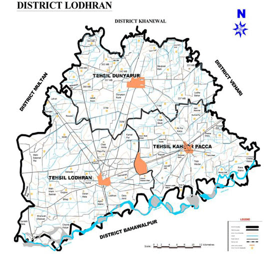 پنجابی: ضلع لودھراں دا نقشہ